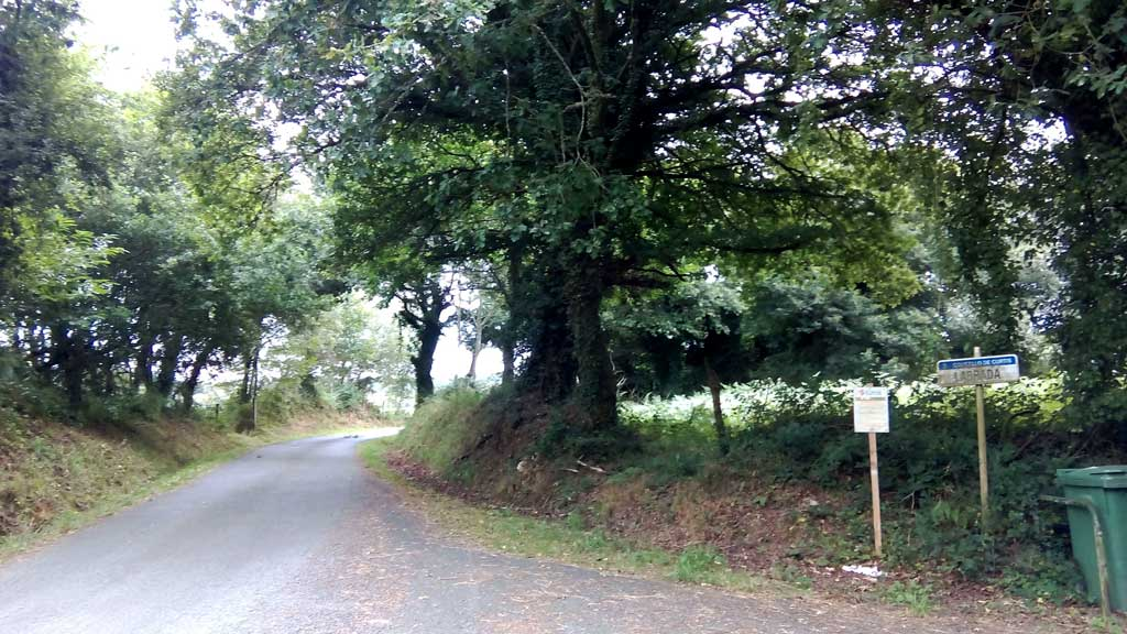 Vista da Labrada, Curtis.